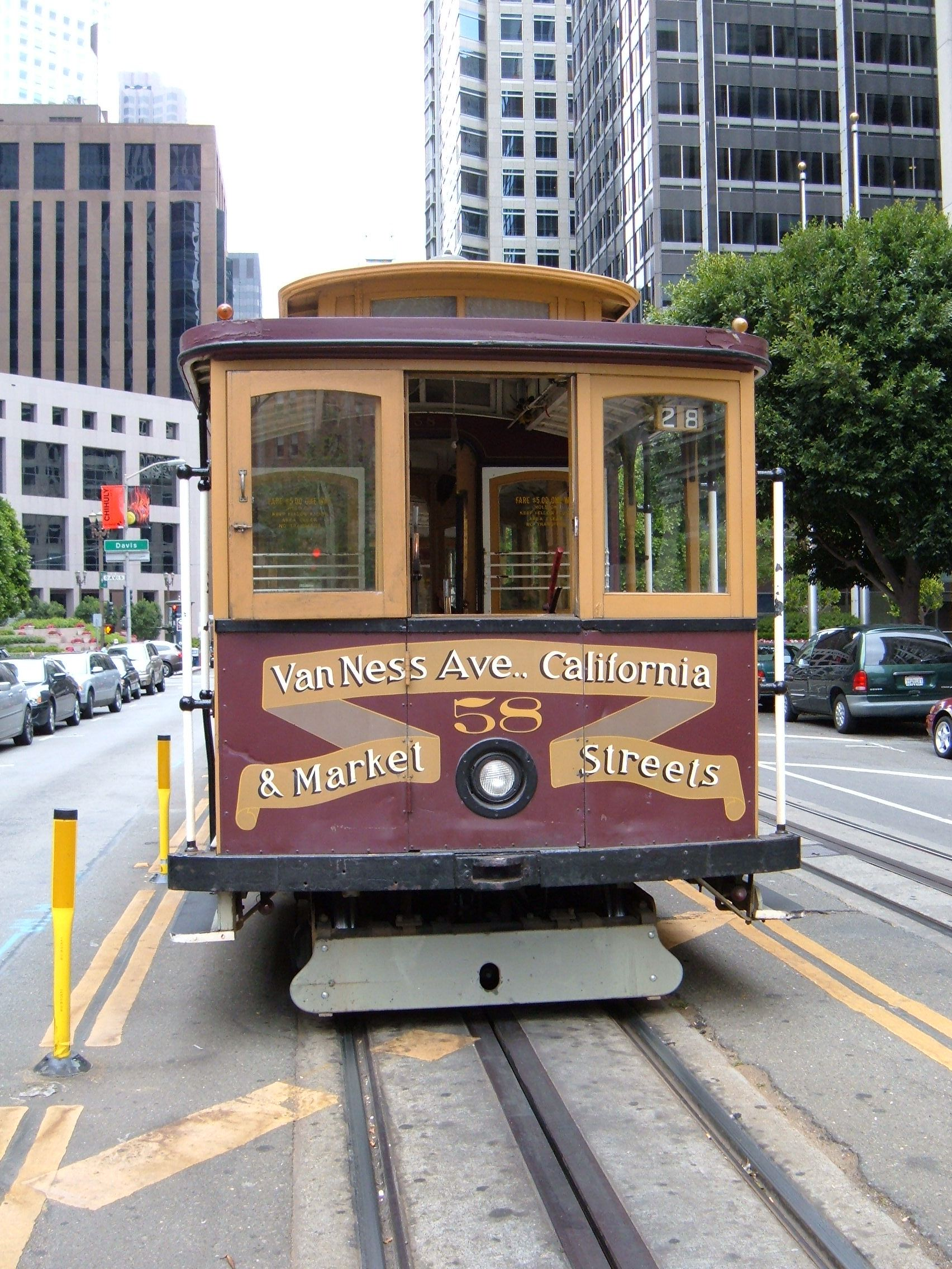 San Francisco cable car no. 58 parked on California Street near Embarcadero Center.